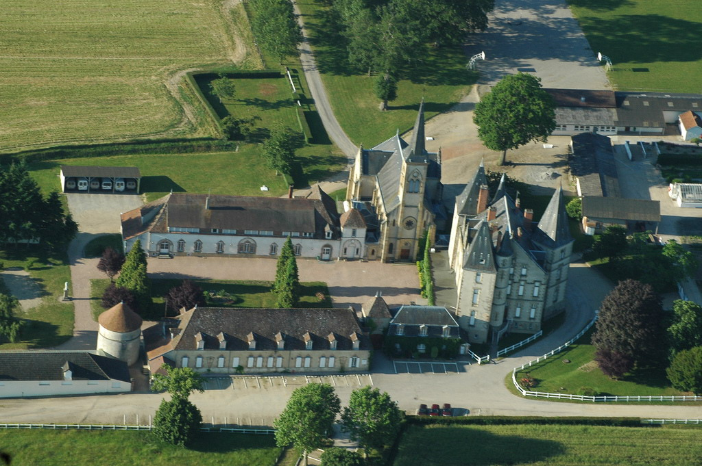 Château de Le Réray, Aubigny (Allier - France). Construit en 1884 Ancien petit séminaire du diocèse de Moulins.